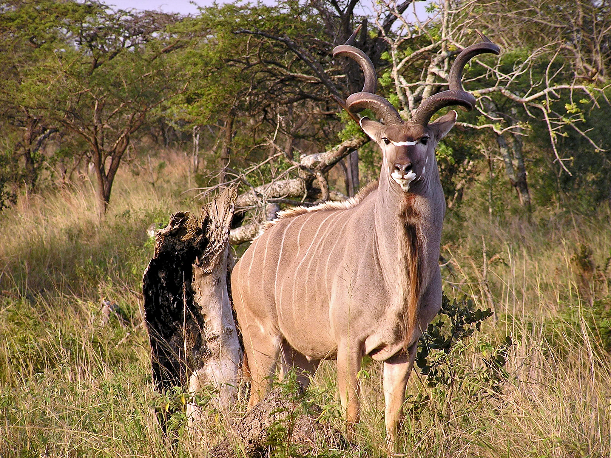 Großer Kudu (Tragelaphus strepsiceros), Hluhluwe/Umfolozi Nationalpark, Südafrika